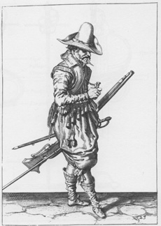 Musket and Arquebus Holland